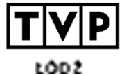 Tymczasowe logo z 2007 roku obowiązujące do wprowadzenia logo wzorowanym na TVP Info.